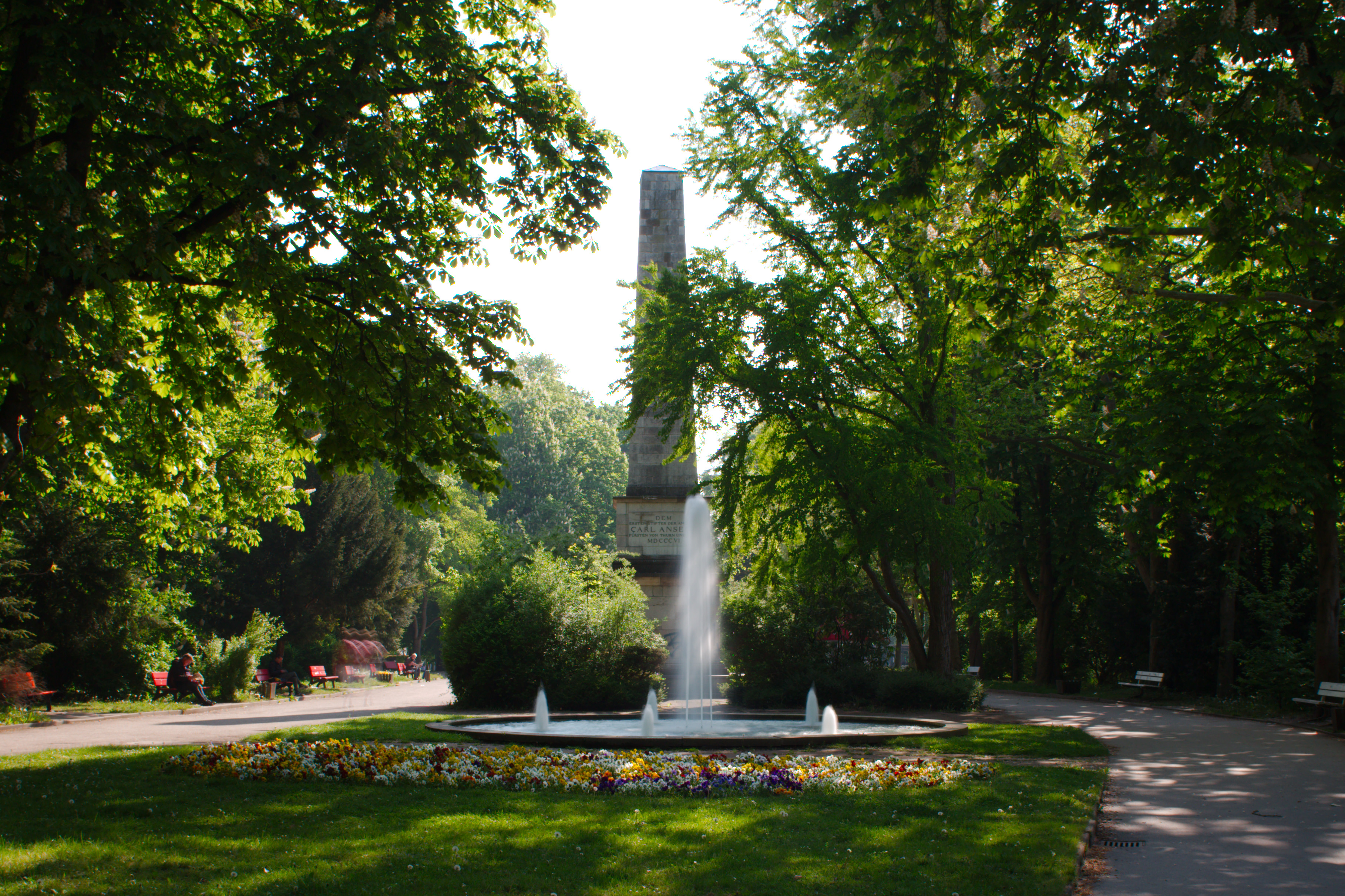 Obelisk für Karl Anselm von Thurn und TaxisThis is a photograph of an architectural monument.